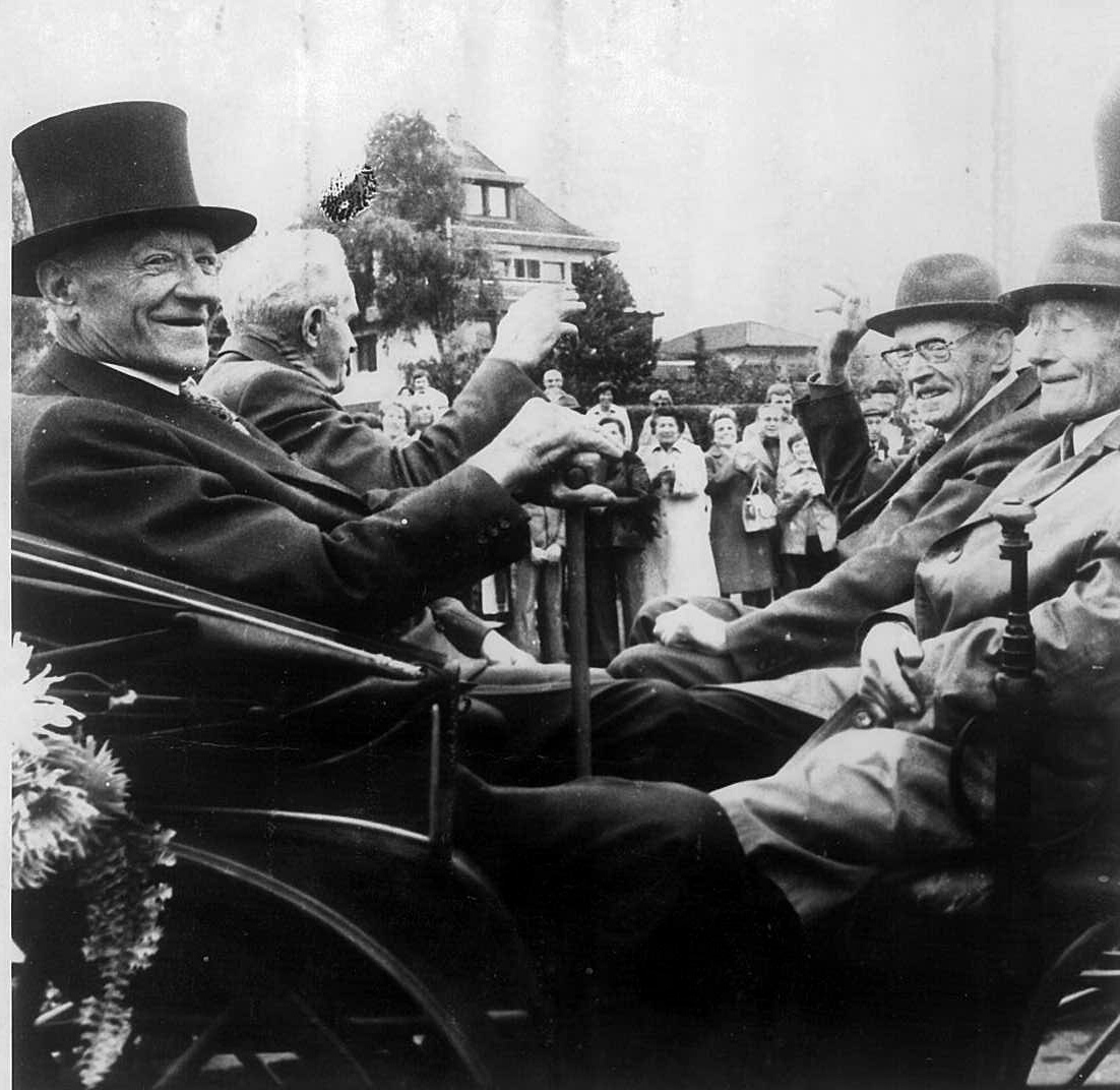 Heinrich Winter war Winzer ("Rebenvater"), erster Nachkriegsbürgermeister, Begründer der Winzerfeste und Erneuerer des Weinbaus in Erzingen (Klettgau) im Landkreis Waldshut in Baden-Württemberg. Winter mit Zylinder, zur Eröffnung des Erzinger Winzerfestes 1962.